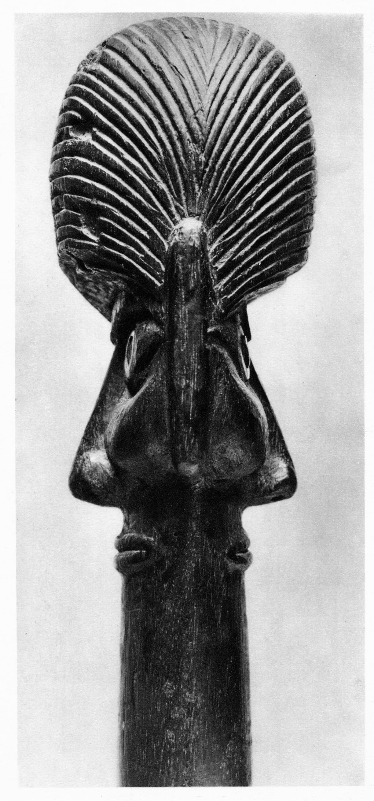 Церемоніальна різьблена з дерева дубина "уа" із зображенням бога морів Тонга Роа.